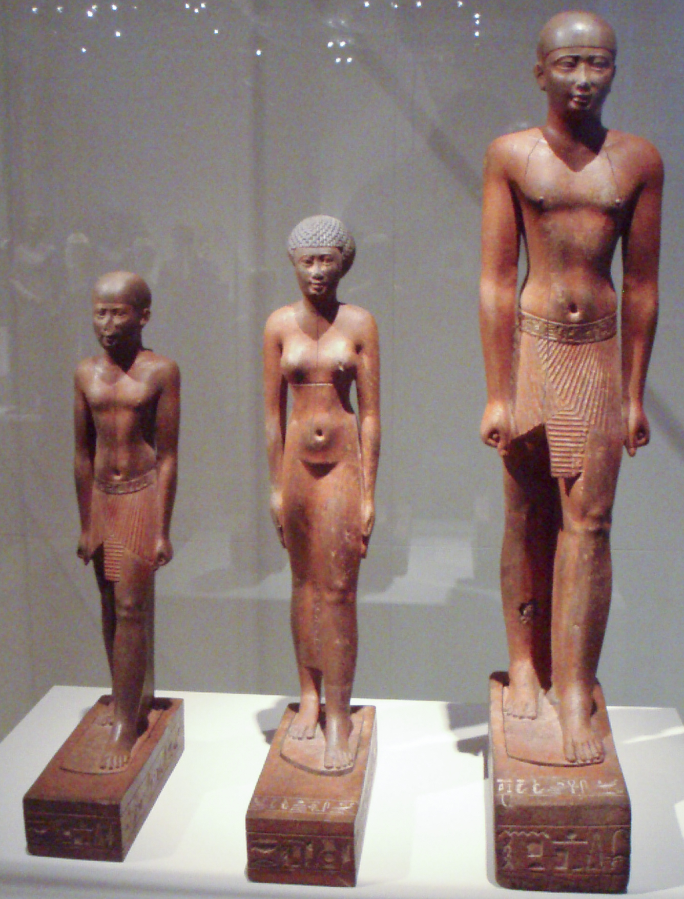 Statuengruppe des Psammetrich, seiner Frau und seines Sohnes; Spätzeit, 26. Dynastie, um 600 v. Chr.; Holz; Ägyptisches Museum/Altes Museum, Inv.-Nr. 8812, 8813, 8814